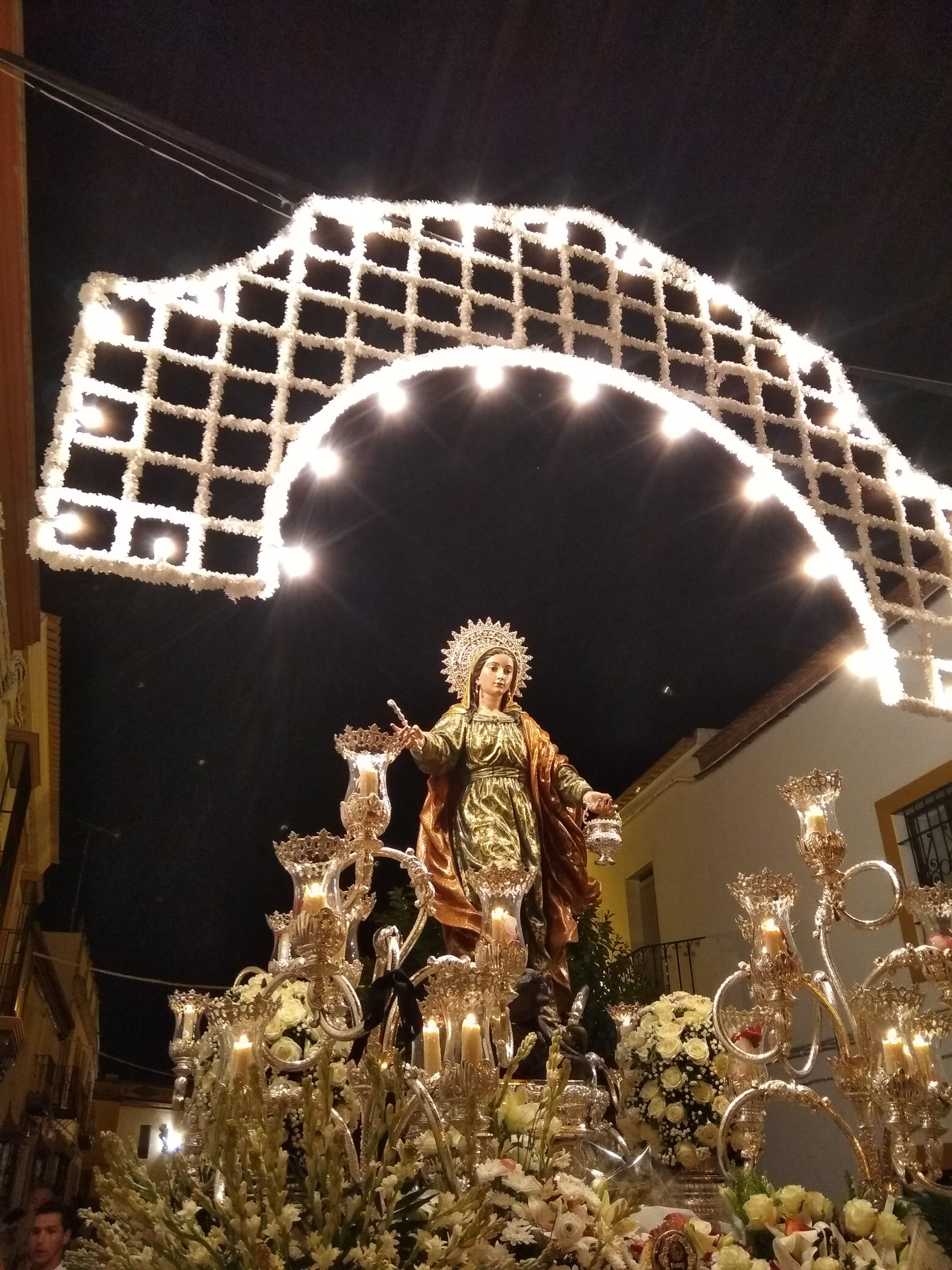 santamarta.pjn2